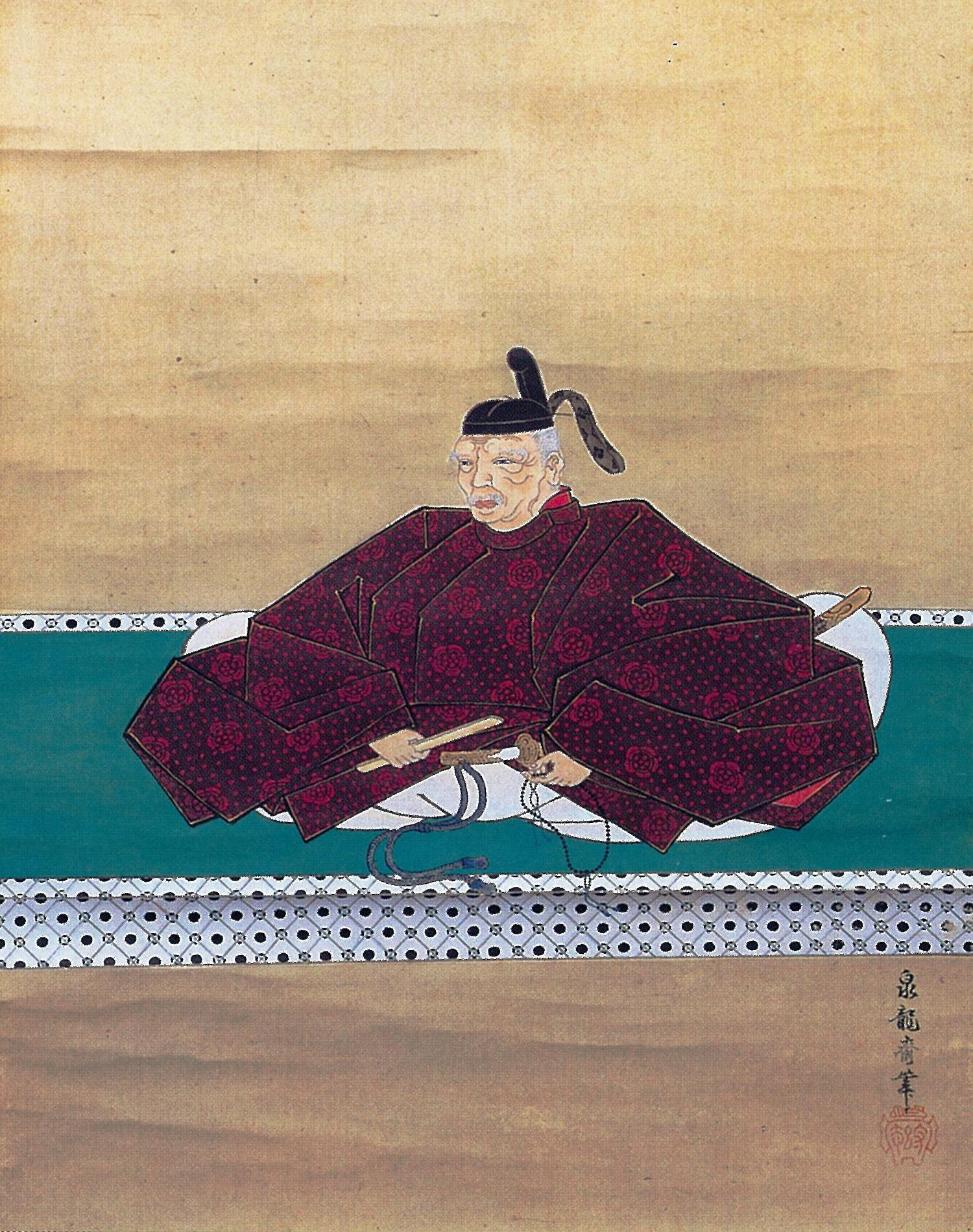 佐々木泉龍 (1808 - 1884) 作『本多正信画像』。 江戸時代初期の大名・本多正信の肖像画。